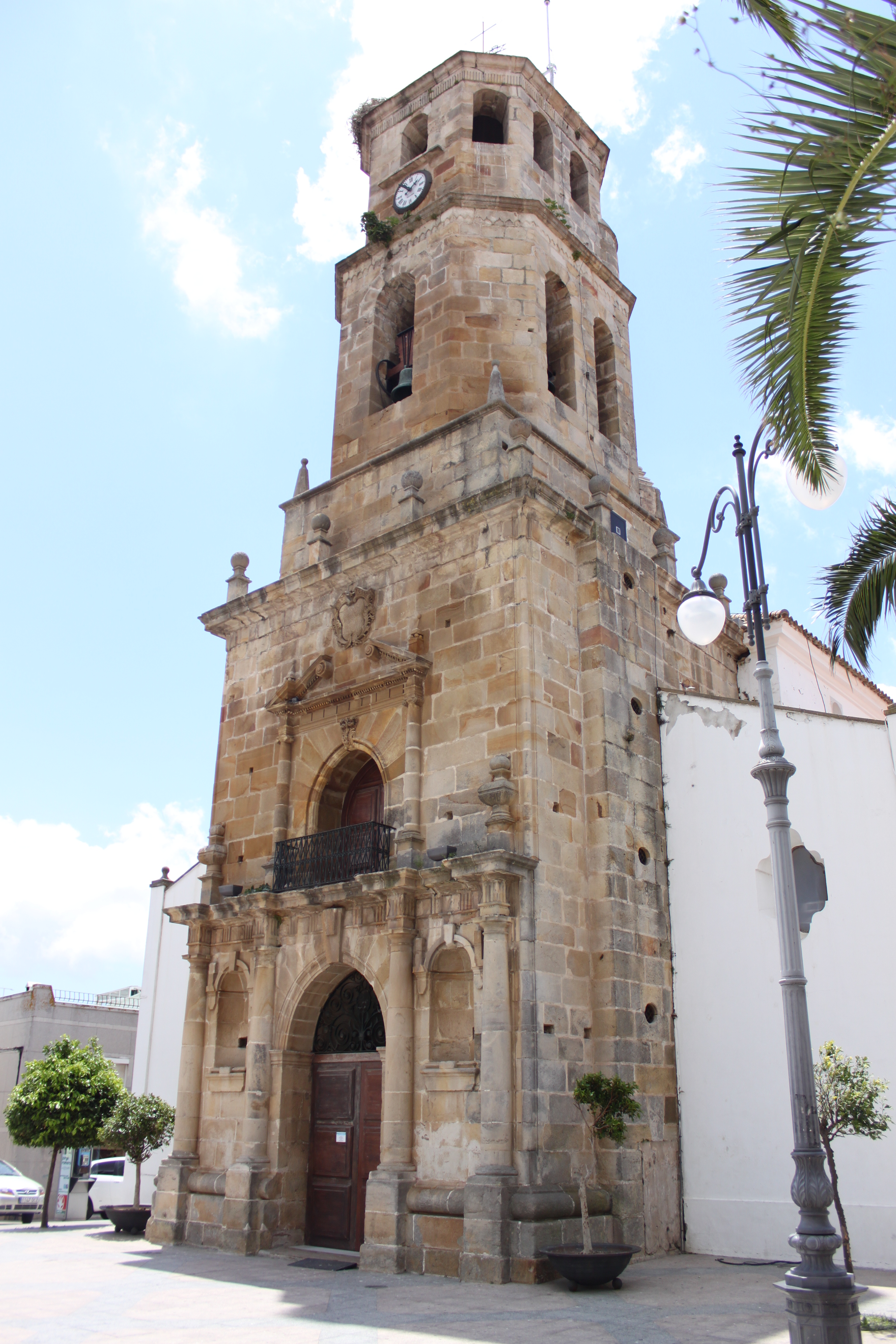 Iglesia de San Isidro de Los Barrios, Andalucía, España